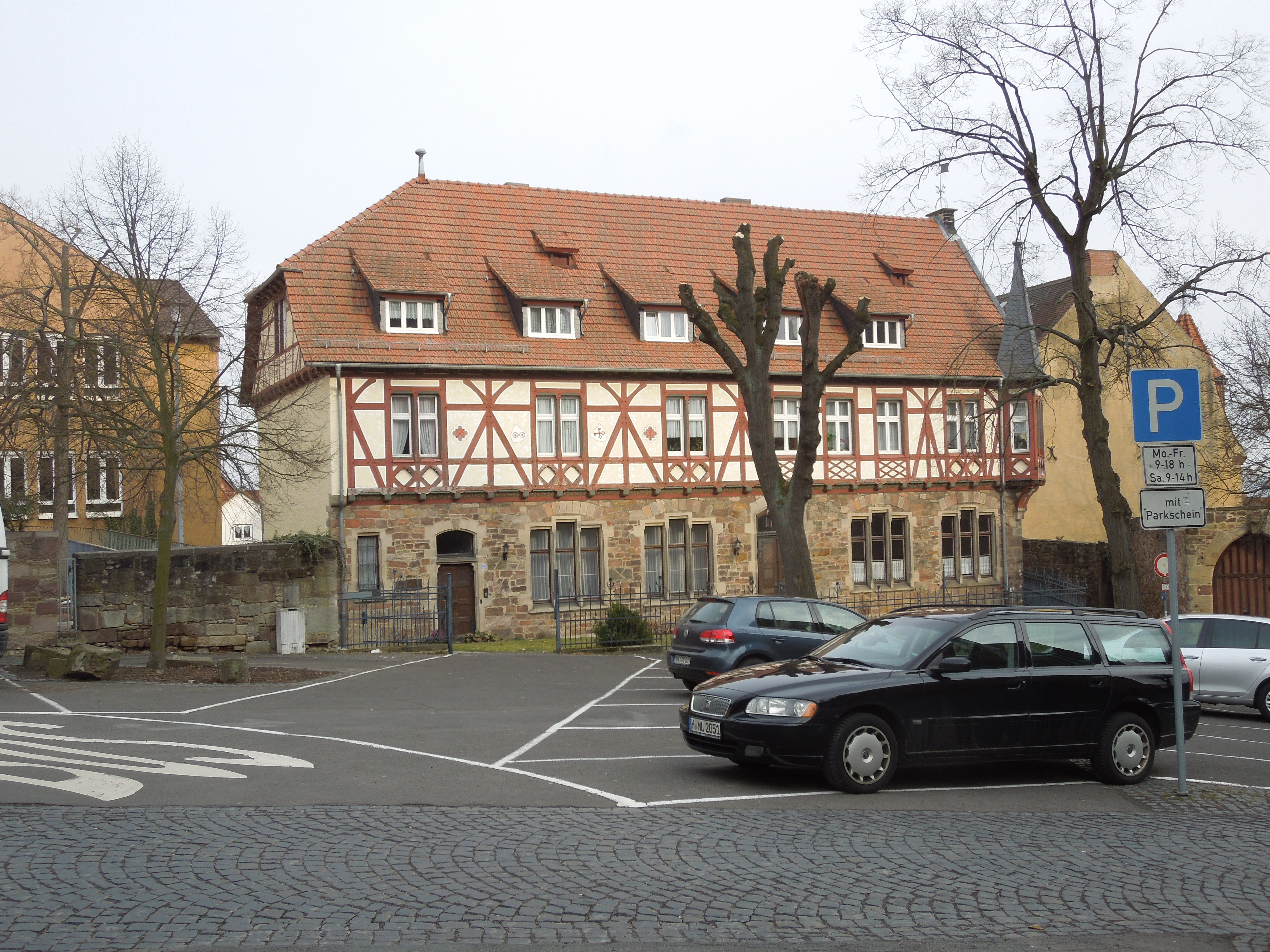 Ehemalige Lateinschule Fritzlar, später "Unterhaus" der König-Heinrich-Schule, erbaut 1891 auf dem Keller und Teilen der Grundmauern der "Großen Kurie auf dem Friedhof", mit Wohnungen im Obergeschoss (Foto 2013); Position 51.1309 Nord, 9.2749 Ost